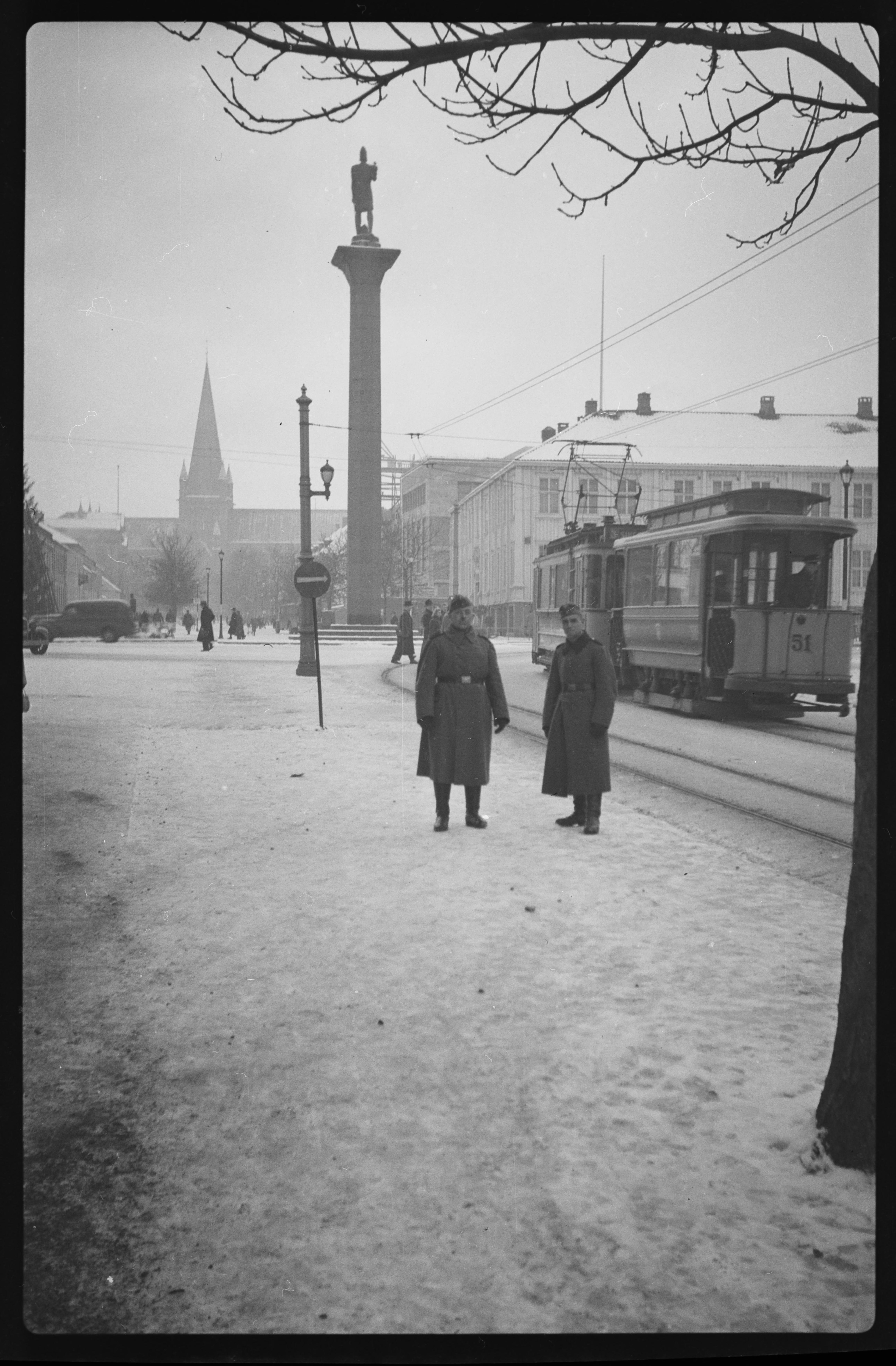 Bildet er hentet fra Nasjonalbibliotekets bildesamling. Anmerkninger til bildet var: Bildene ble gitt Nasjonalbiblioteket av soldatens datter, som bor i Tyskland. Faren snakket sjelden om denne perioden i sitt liv der han jobbet med veiarbeid og jernbane. Hun visste ingenting om bildene og hvor i Norge han var stasjonert. Det skal ha vært flere bilder, men de har blitt ødelagt. Trondheim, Trondheim, Sør Trøndelag